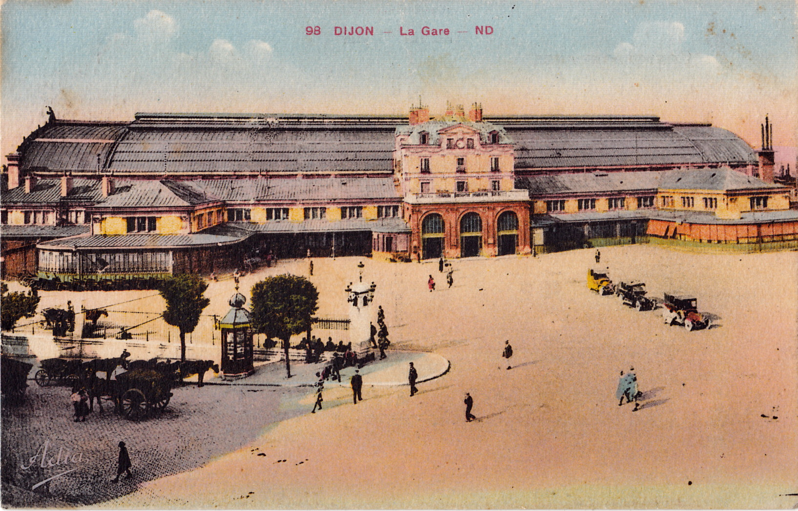 Carte postale ancienne éditée par ND, n°98, collection Adia : DIJON - La gare